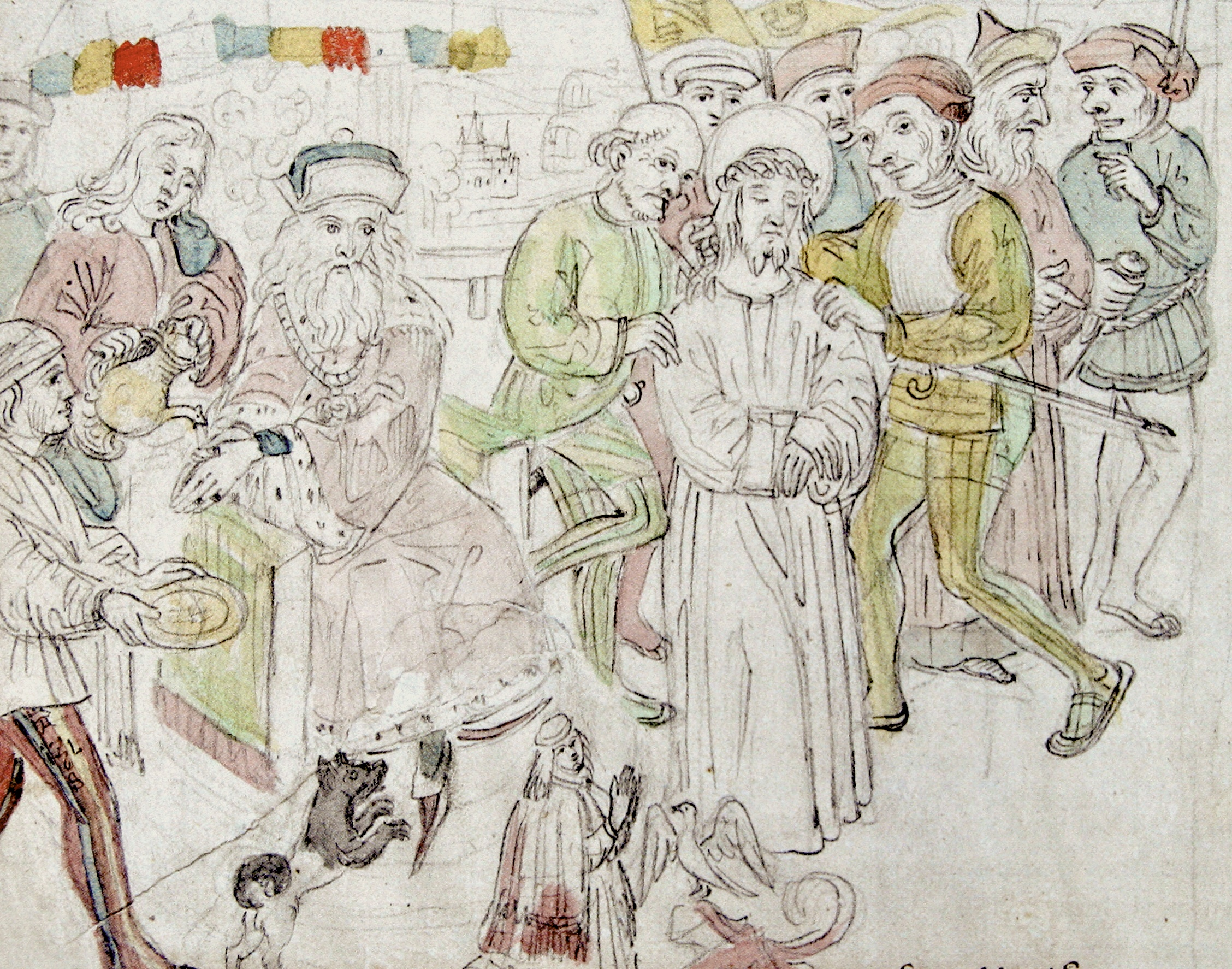 Kloster Töss Verurteilung Jesu, Zeichnung von Paul Julius Arter, um 1830